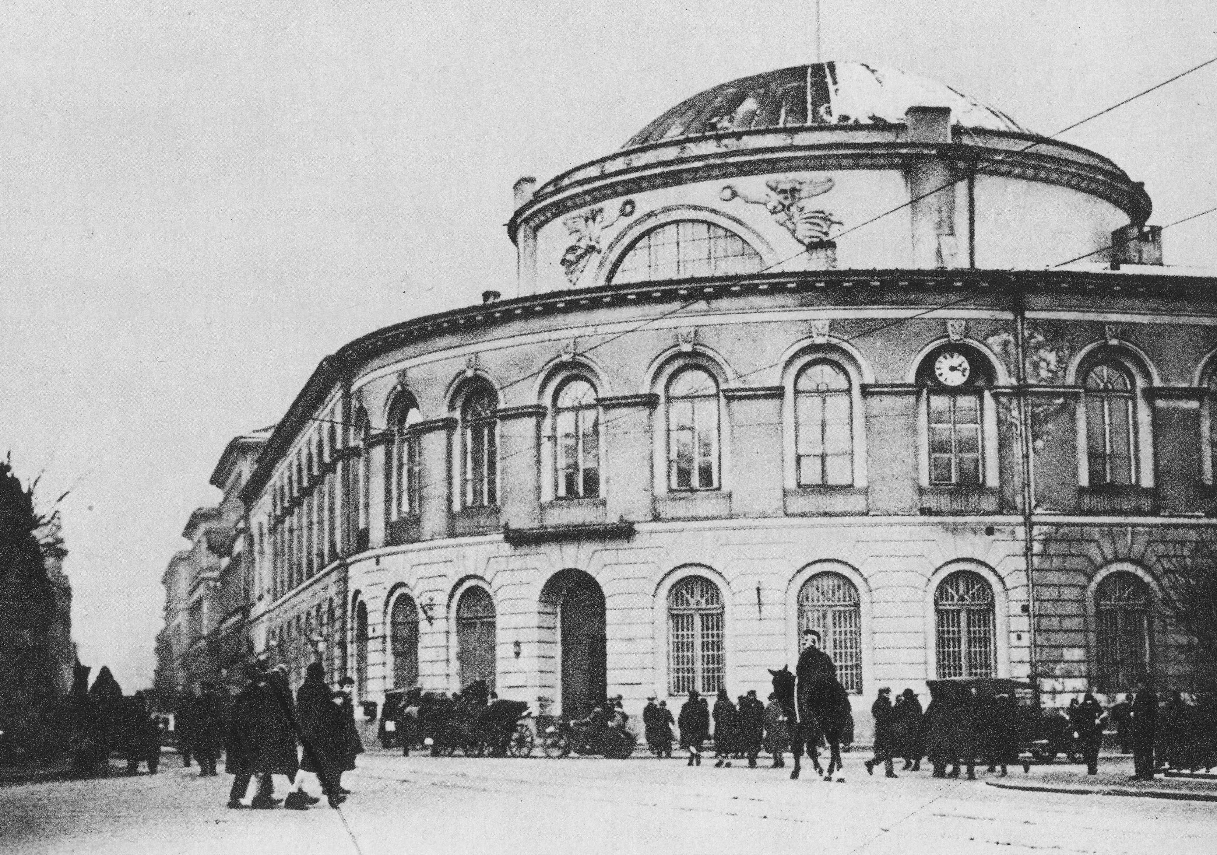 Budynek Banku Polskiego na placu Bankowym w Warszawie w okresie międzywojennym